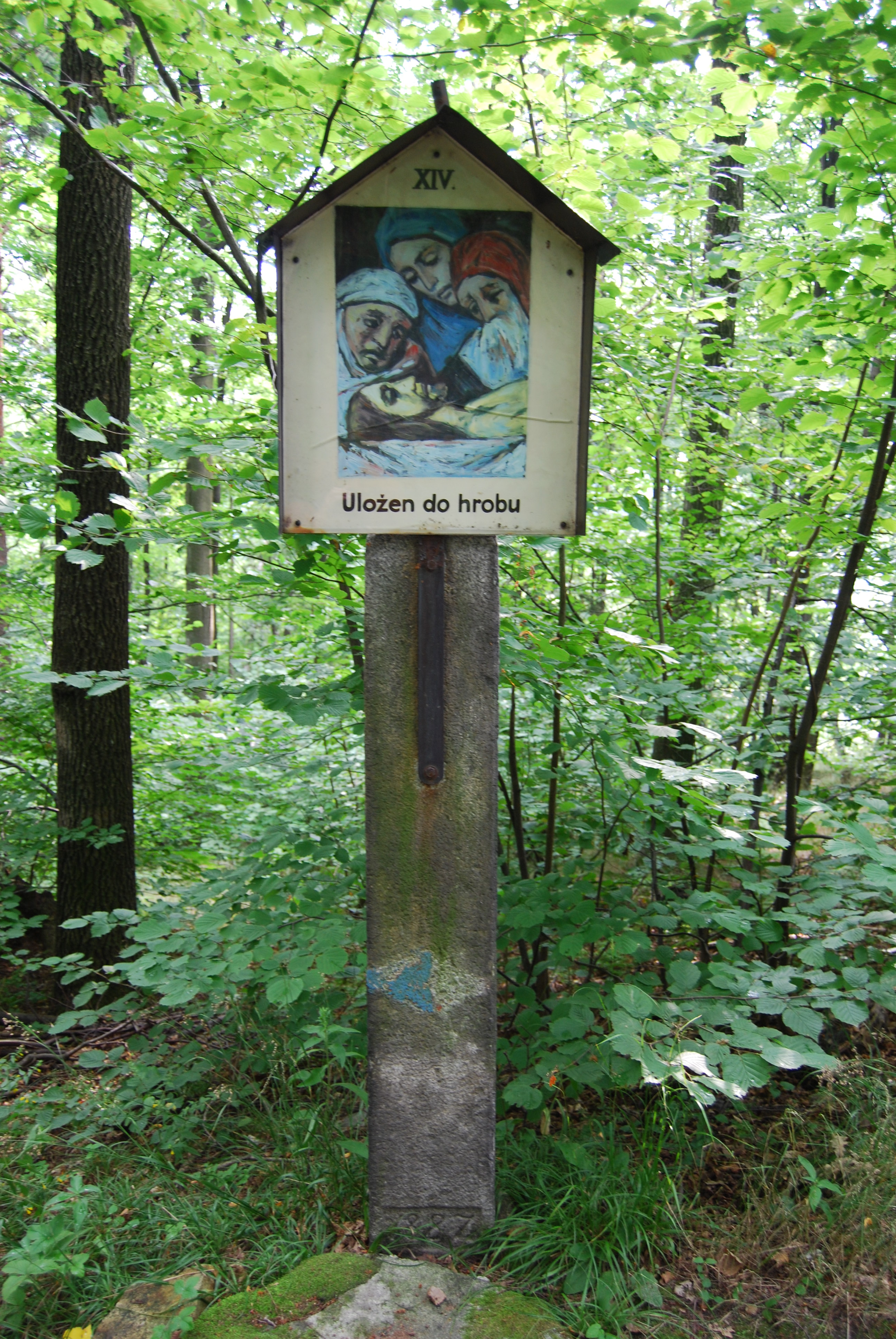 Jedno za zastavení křížové cesty poblíž kostela. Poutní místo - kostel Panny Marie Bolestné. Boží hora (německy Gotthausberg) vrchol v Žulovské pahorkatině u obce Žulová. Okres Jeseník. Česká republika.